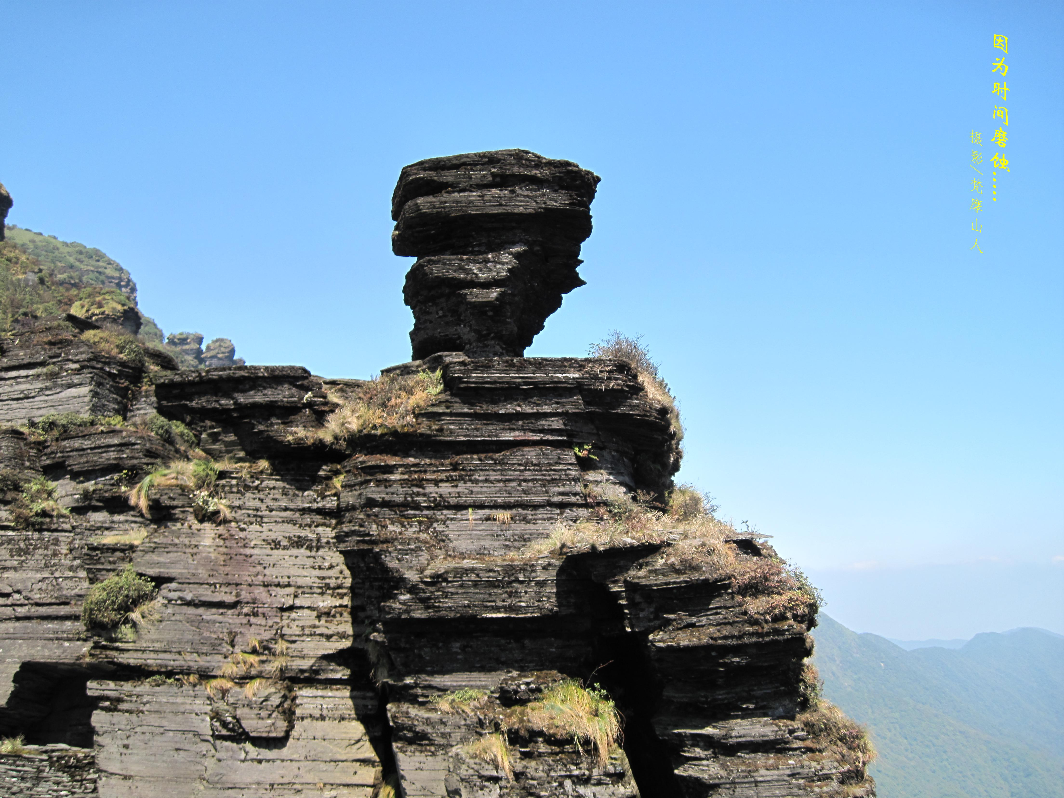 梵净山万卷书岩